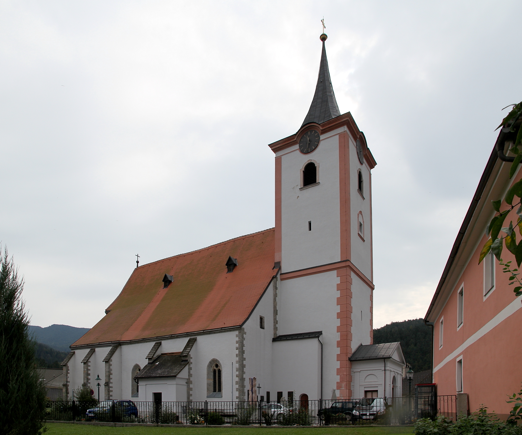 Die Nordansicht der kath. Pfarrkirche hl. Martin in der niederösterreichischen Marktgemeinde Türnitz.